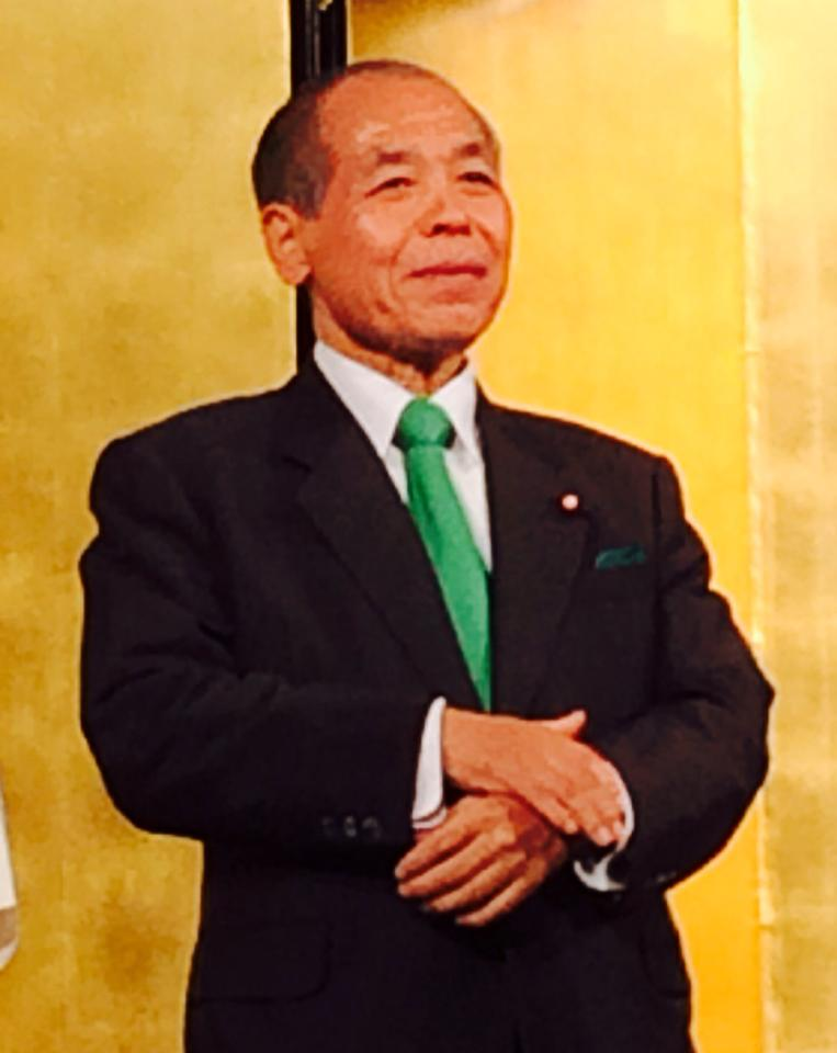 2014.9.18. 鈴木宗男を叱咤激励する会にて